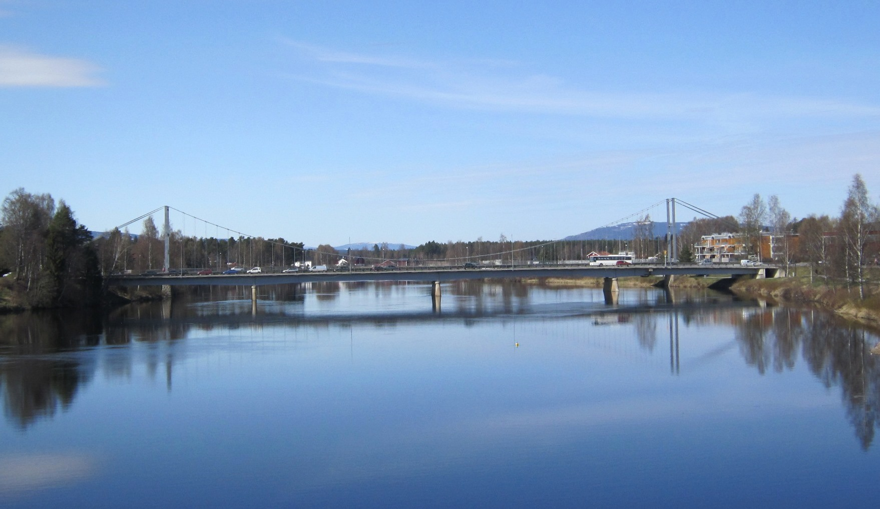 Glåmbrua i Elverum med Nybrua (1936) i bakgrunnen